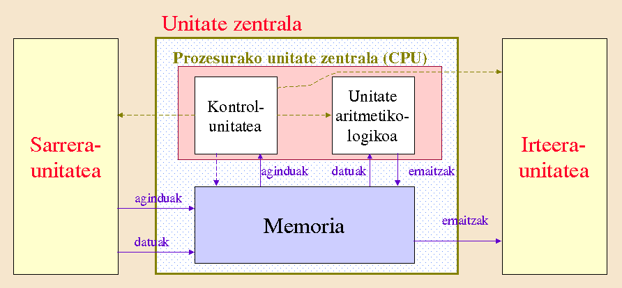 Konputagailuaren osagaiak